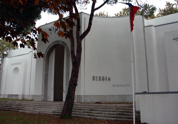 Padiglione Serbia presso Giardini Biennale